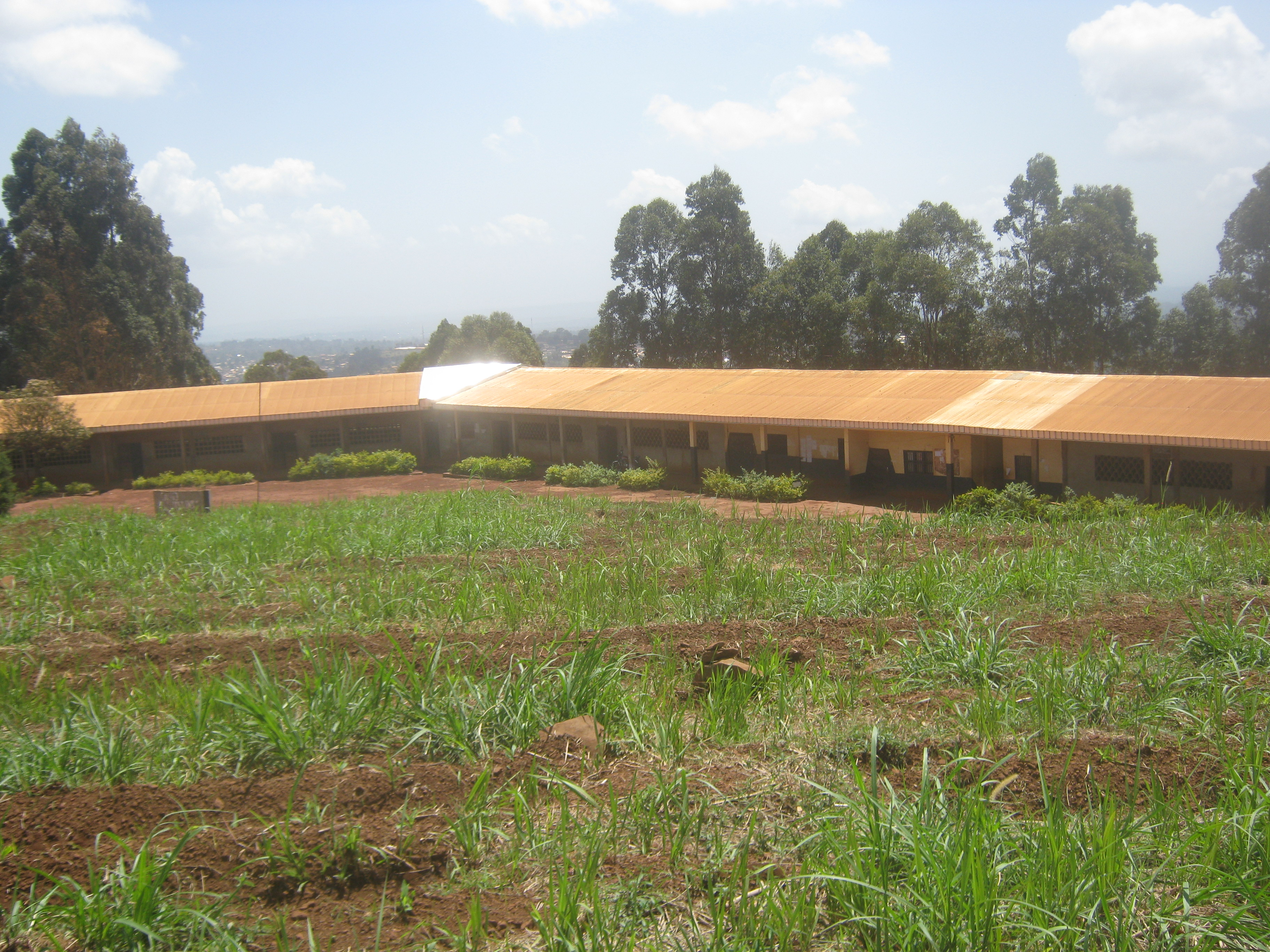 Le lycée de Bamougong est l'un des plus grands établissements d'enseignement secondaires du Département des Bamboutos. Situé à mi-chemin entre la ville de Mbouda et la ville de Batcham, ses élèves viennent non seulement du Groupement Bamougong mais aussi de ces deux villes environnantes.